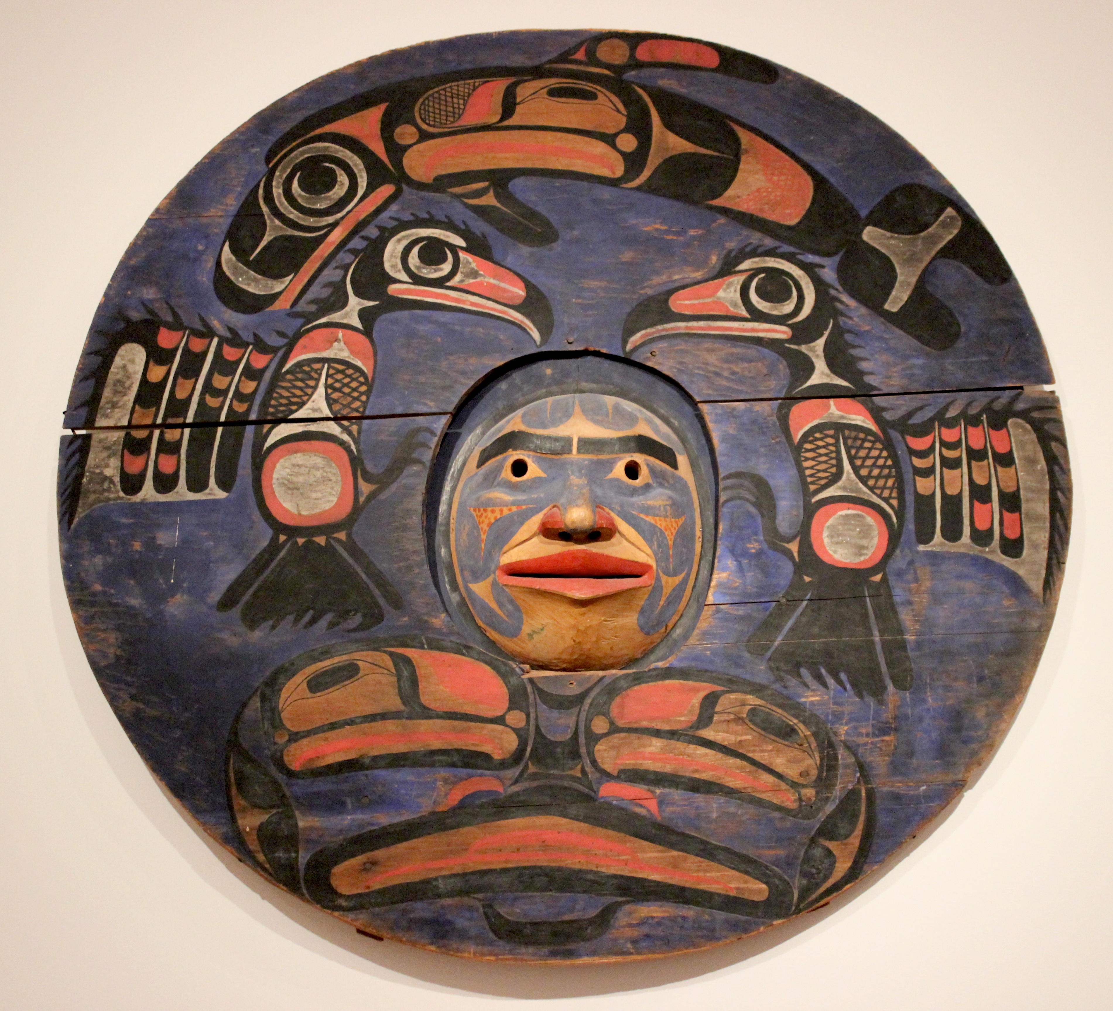 Disco de madera en relieve Nuxalk. Seattle Art Museum.